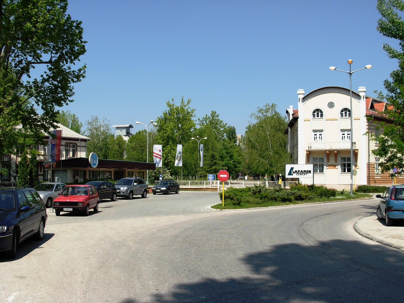 Ulaz u Lafarge Beočinsku fabriku cementa.